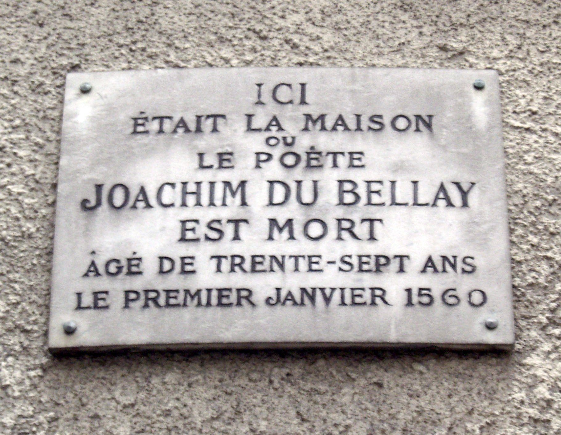 Plaque apposée à l'intersection de la rue Chanoinesse et de la rue Massillon, Paris 4e. « Ici était la maison où le poète Joachim du Bellay est mort âgé de trente-sept ans le premier janvier 1560. »